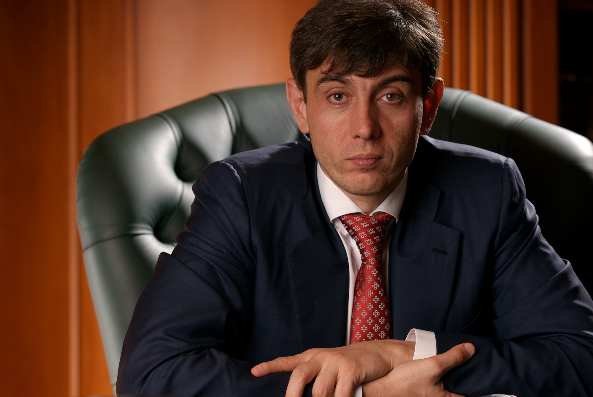 Российский предприниматель Сергей Галицкий